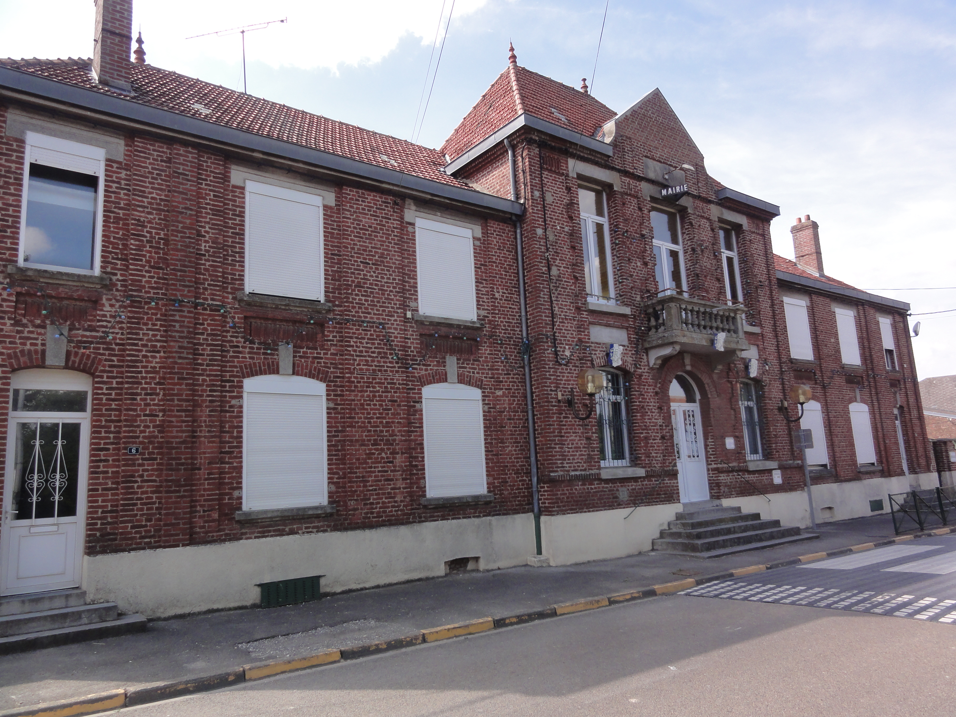 Villeret (Aisne) mairie